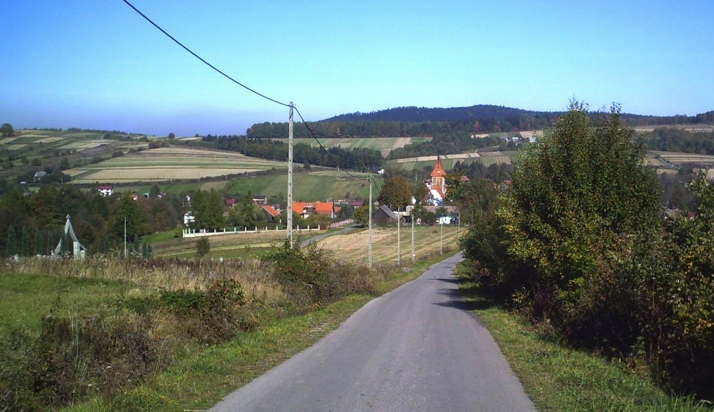 Widok na kościół w Zakrzowie z drogi zbiegającej z Chełmu. Autor: Suwaj Władysław (2006).